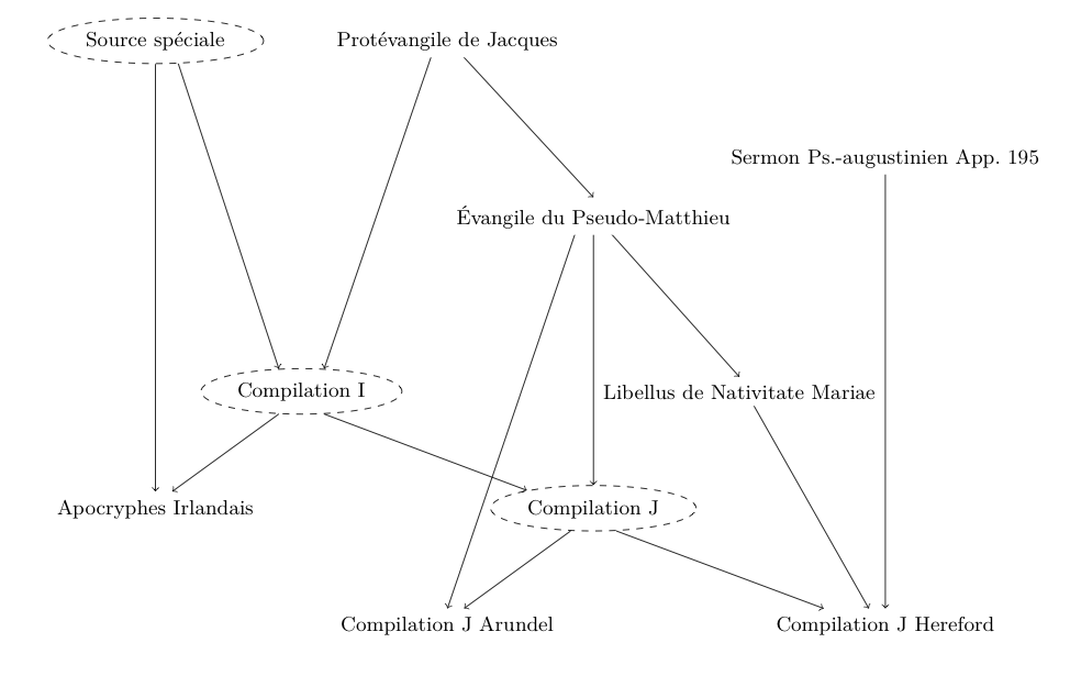 Les textes entourés sont des conjectures de la recherche.